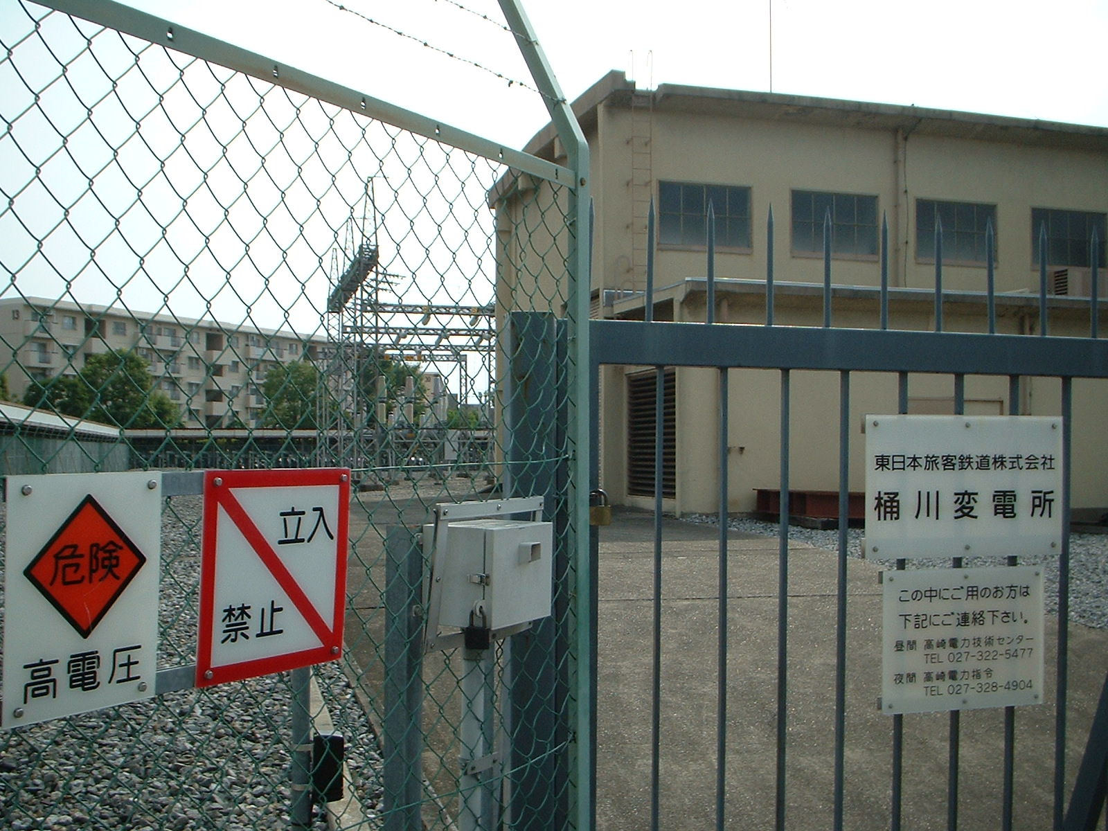 JRの桶川変電所